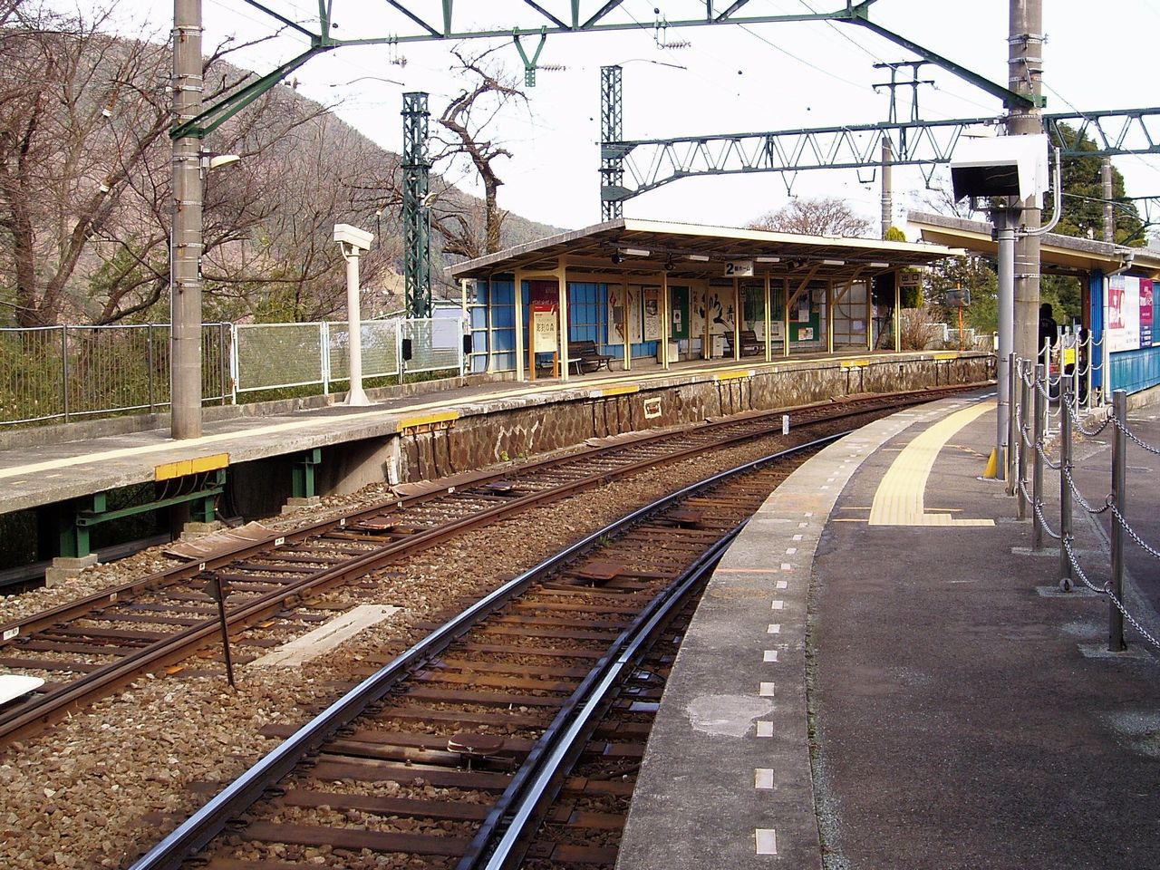 Chokoku-no-mori Station, on the Hakone Tozan Line, Hakone, Kanagawa 彫刻の森駅